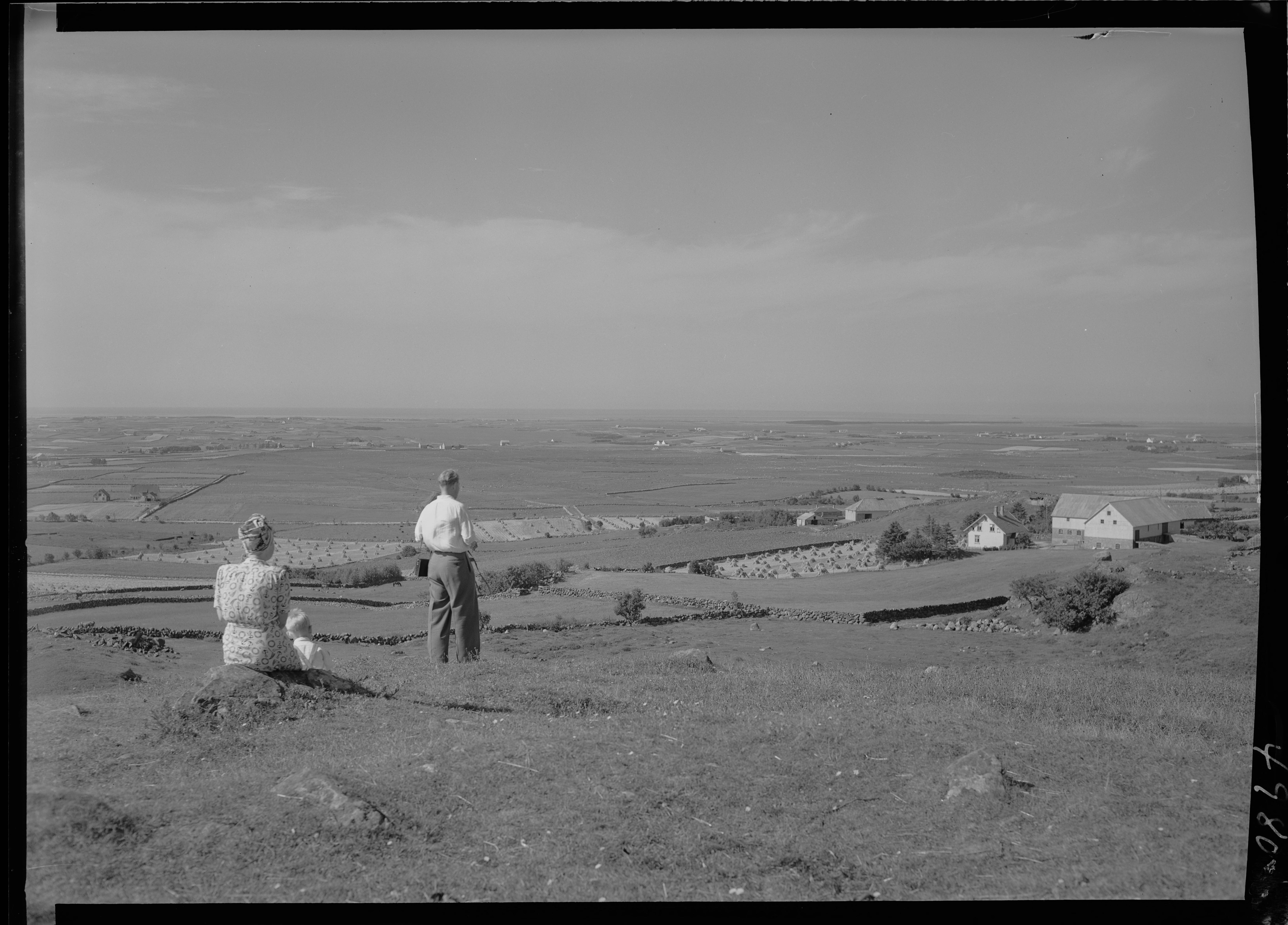 Bildet er hentet fra Nasjonalbibliotekets bildesamling. Anmerkninger til bildet var: Fotograf : ukjent Bryne,Jæren,Tinghaug, Time, Rogaland